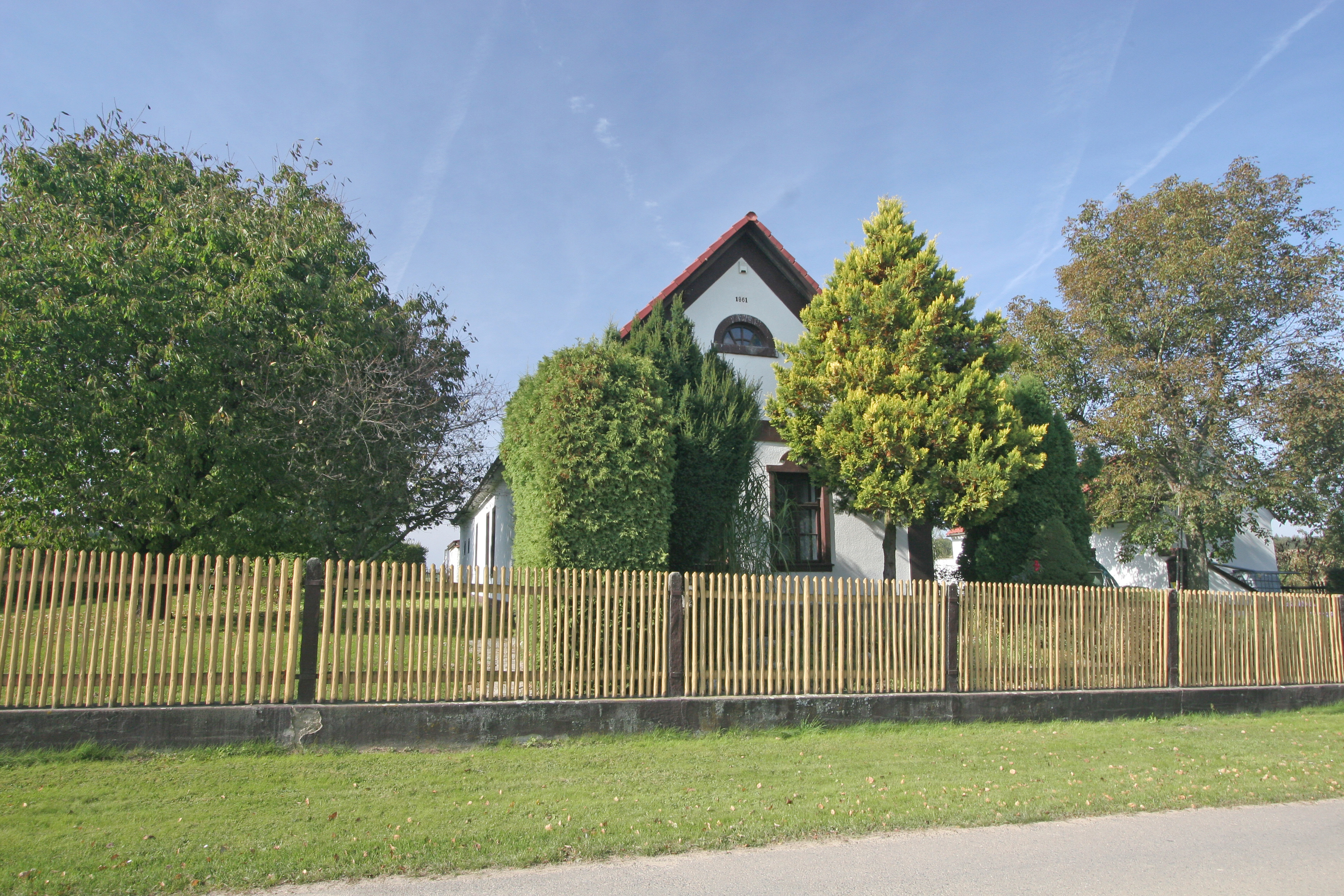 Pelechov čp. 5